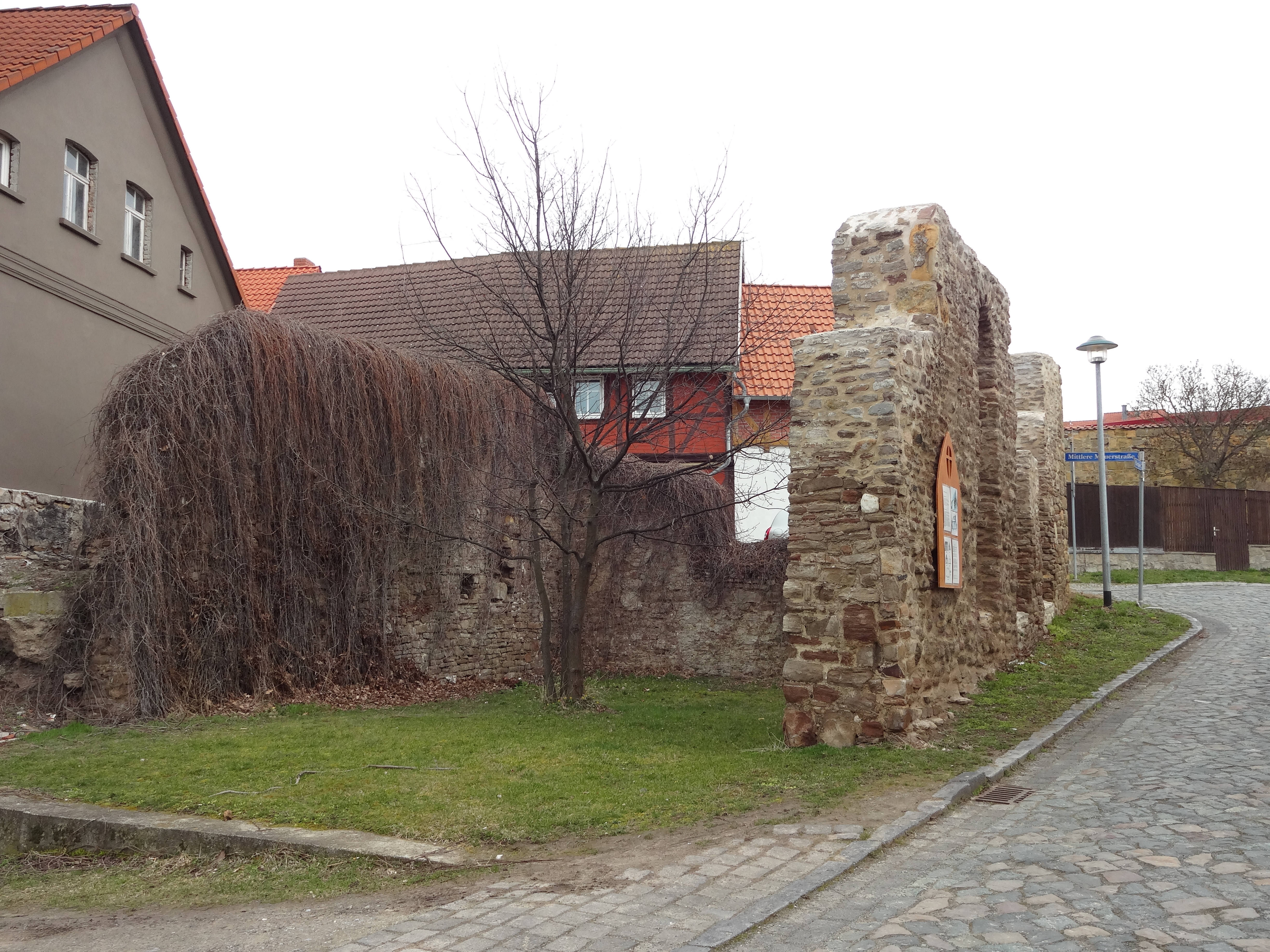 denkmalgeschützte Kalandskapelle in der Pfarrgasse in Derenburg, Ortsteil von Blankenburg (Harz)